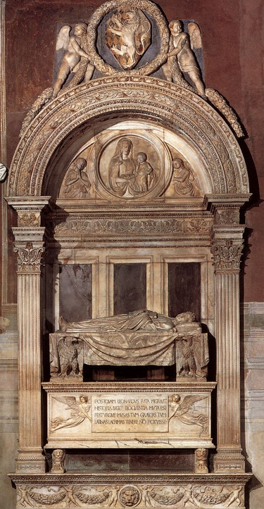 Monumentale Grabstätte zu Ehren des Kanzlers und Humanisten Leonardo Bruni mit architektonischem Aufbau, gerahmt von korinthischen Säulen mit Kompositkapitell